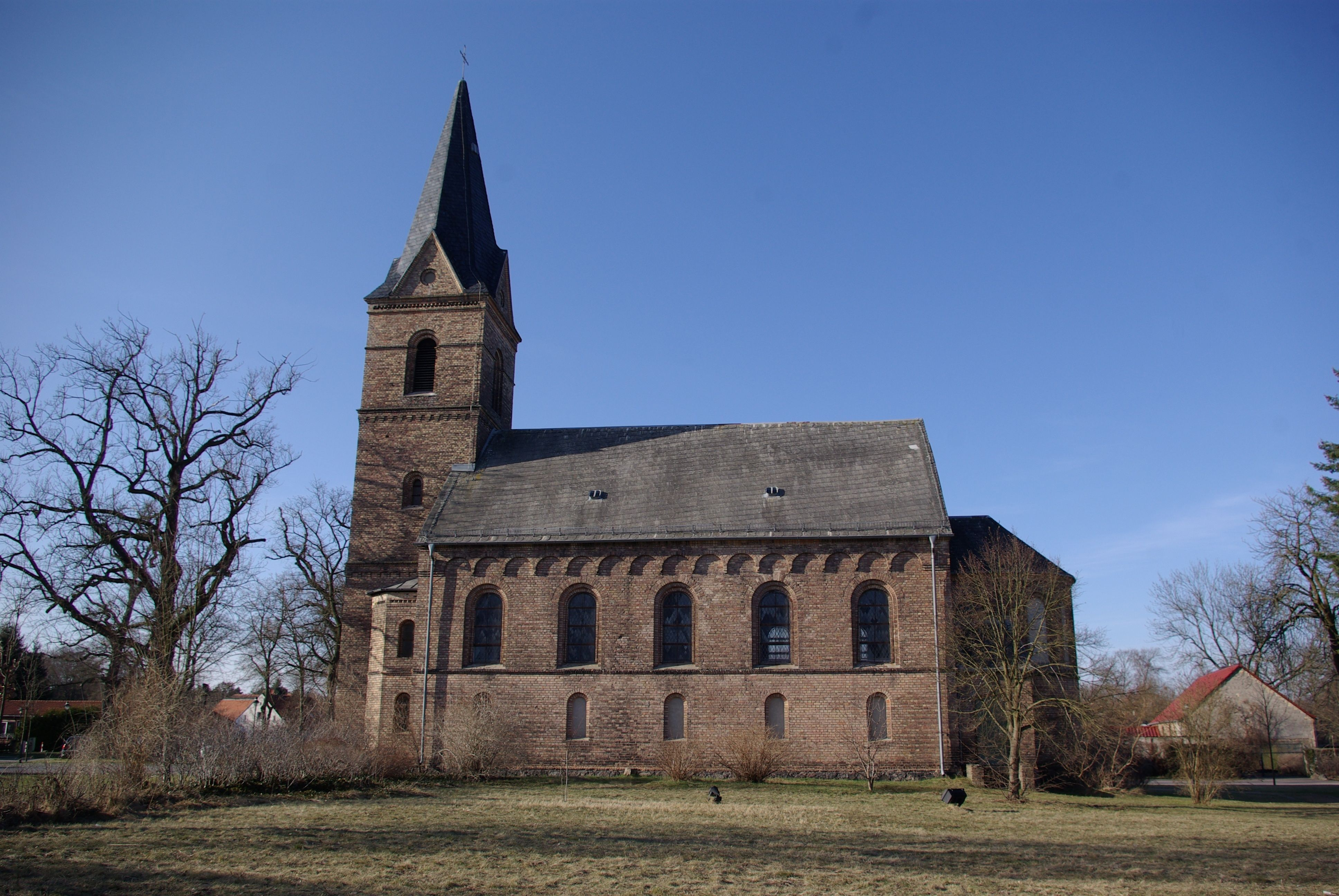 Prieros in der Gemeinde Heidesee in Brandenburg. Die Kirche im Mittelpunkt des Ortes steht unter Denkmalschutz.